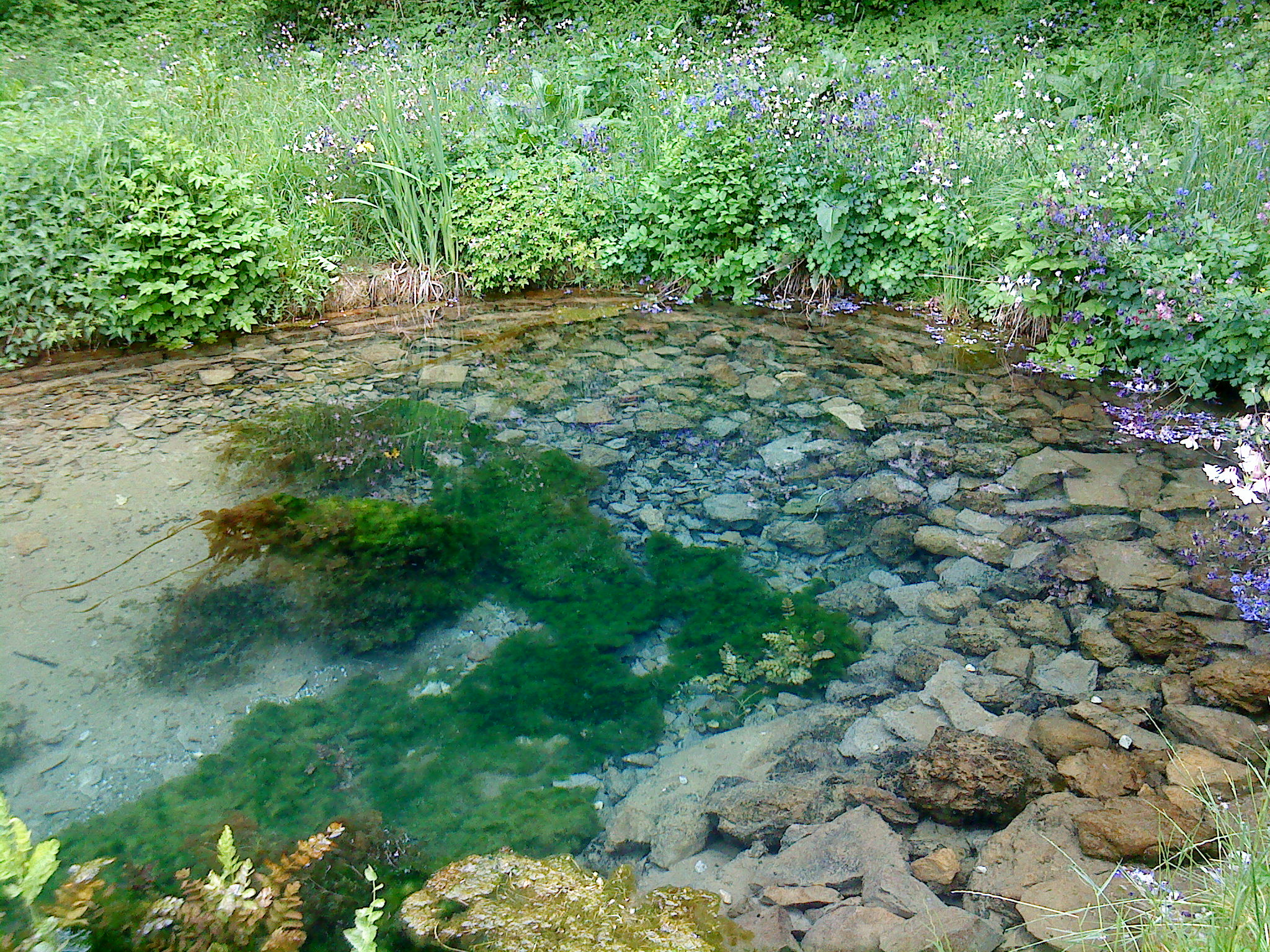 Quellaustritte in der Mühlbachquelle bei Dietfurt